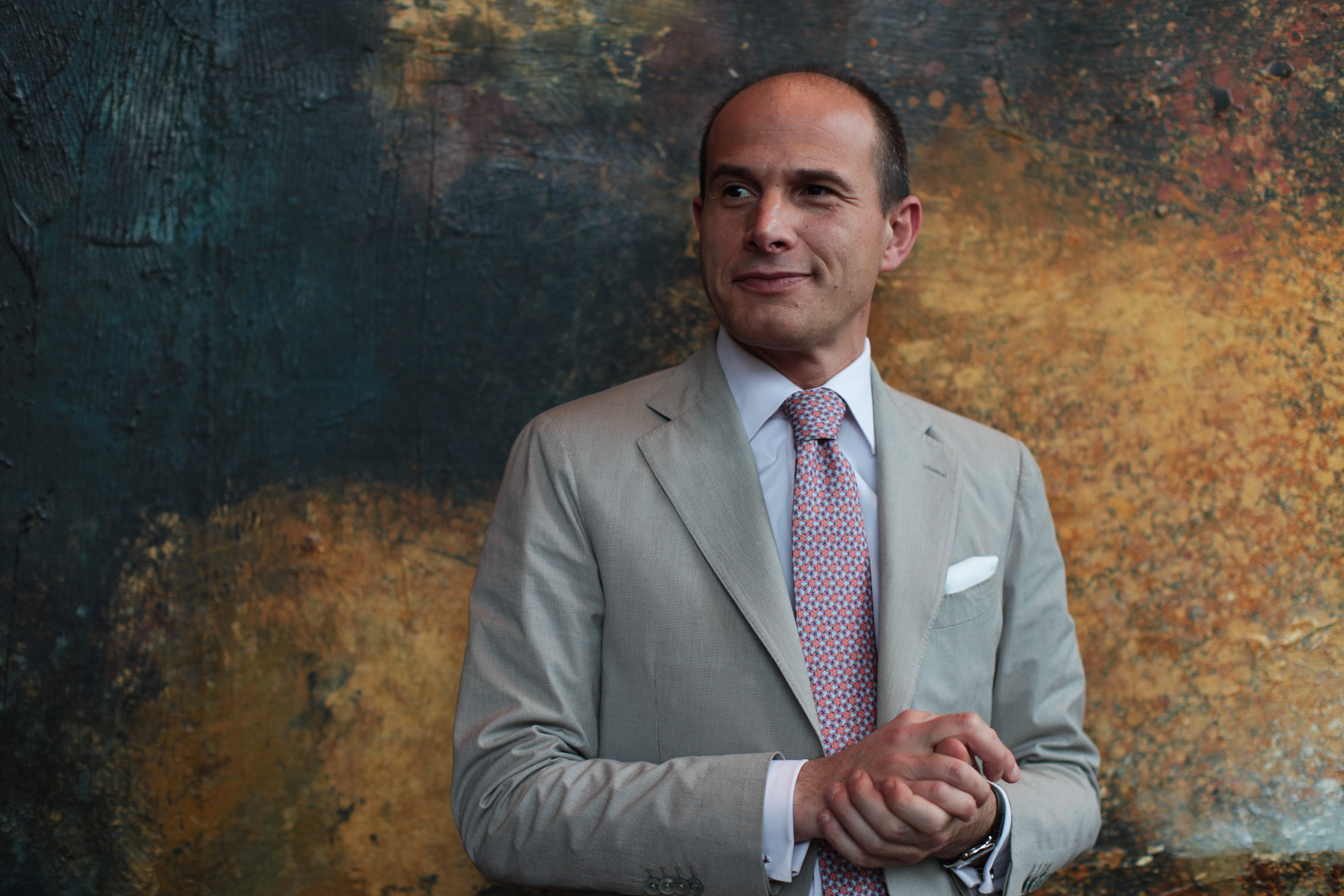 Foto Noci